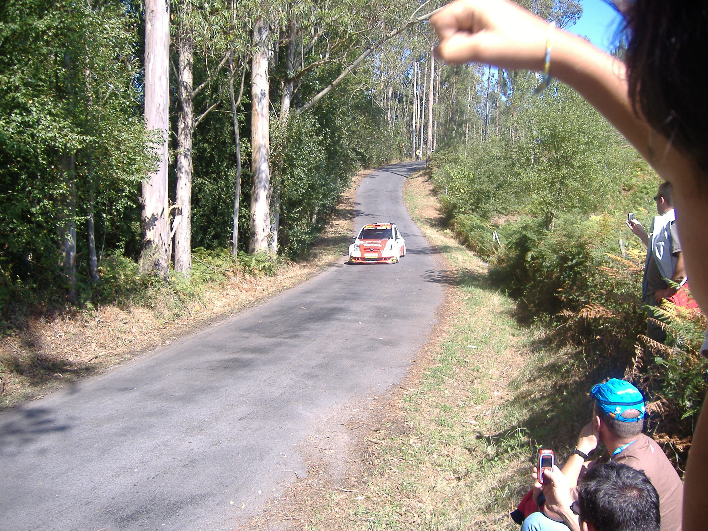 Dani Sordo en el Rally de Ferrol de 2005